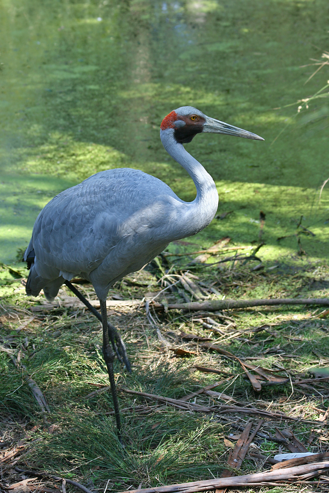 Brolga (Grus rubicunda) at Healesville, Victoria, Australia.